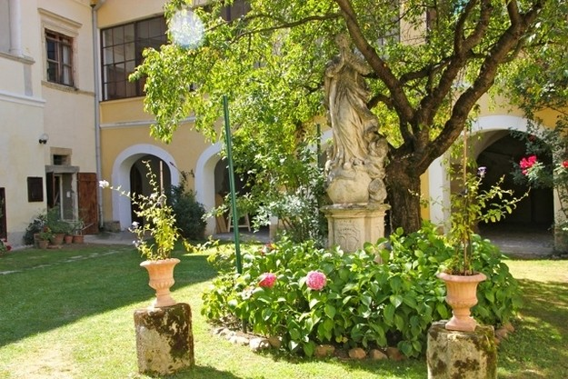 Innenhof mit Mariensäule - Schloss Sankt Georgen an der Stiefing (Stmk./Ö)